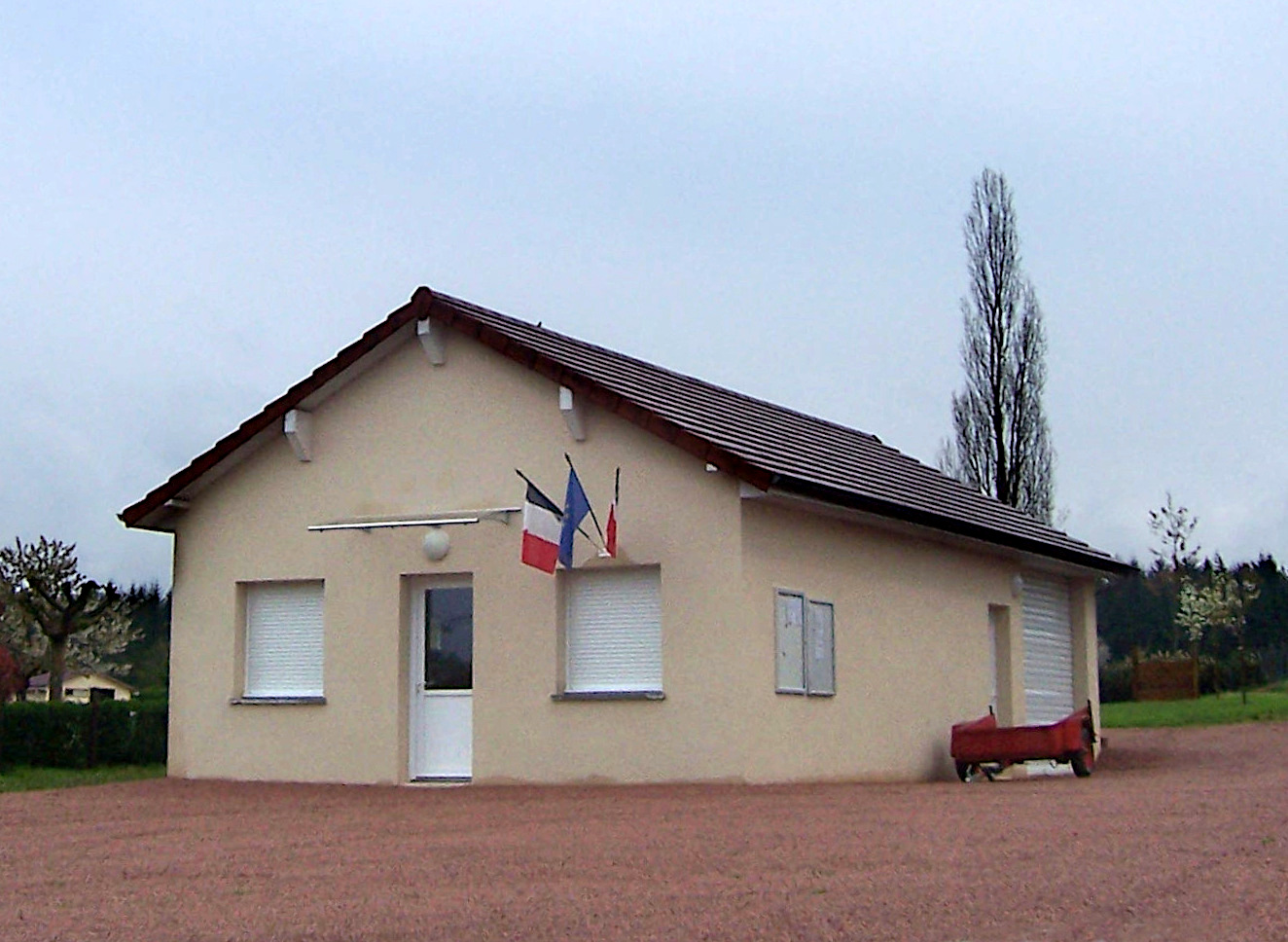 Mairie de Nochize